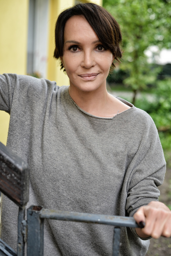 Deutsche Film-und Bühnenschauspielerin